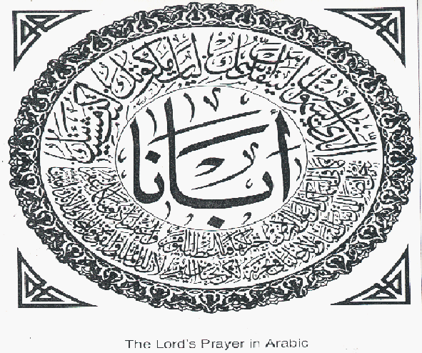 Caligrafía árabe del padre nuestro.